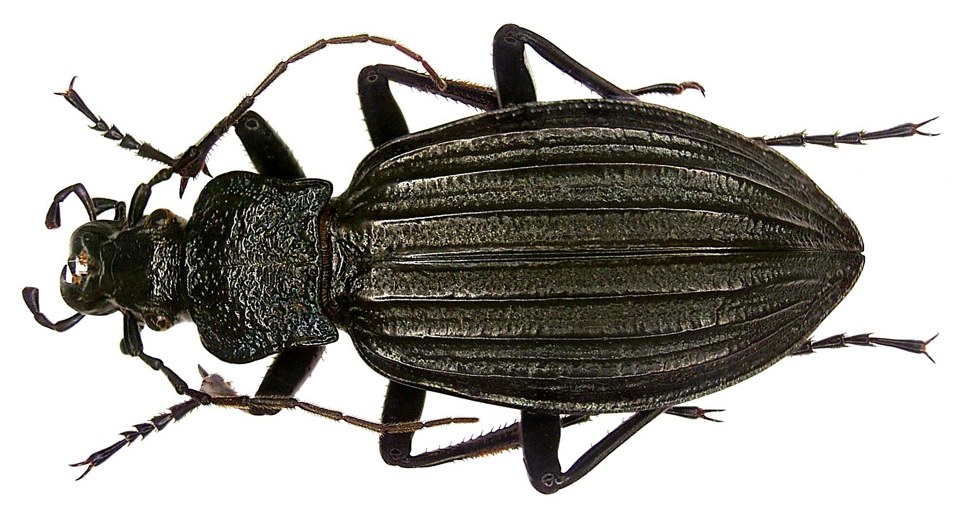 Familie: Carabidae Größe: 35 mm Fundort: Türkei, Artvin, Kafkasor leg. det. K.Staven, 1993 Foto: U.Schmidt, 2008